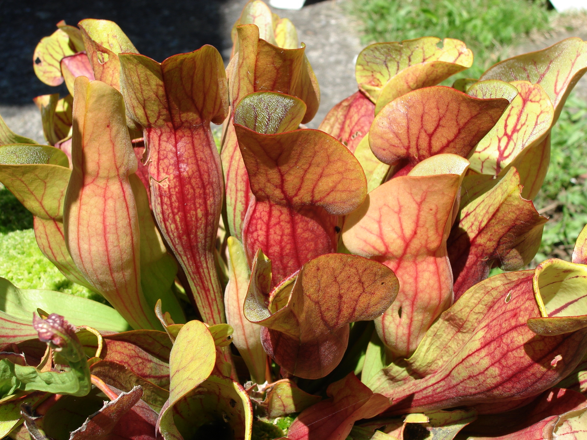 Sarracenia purpurea - France